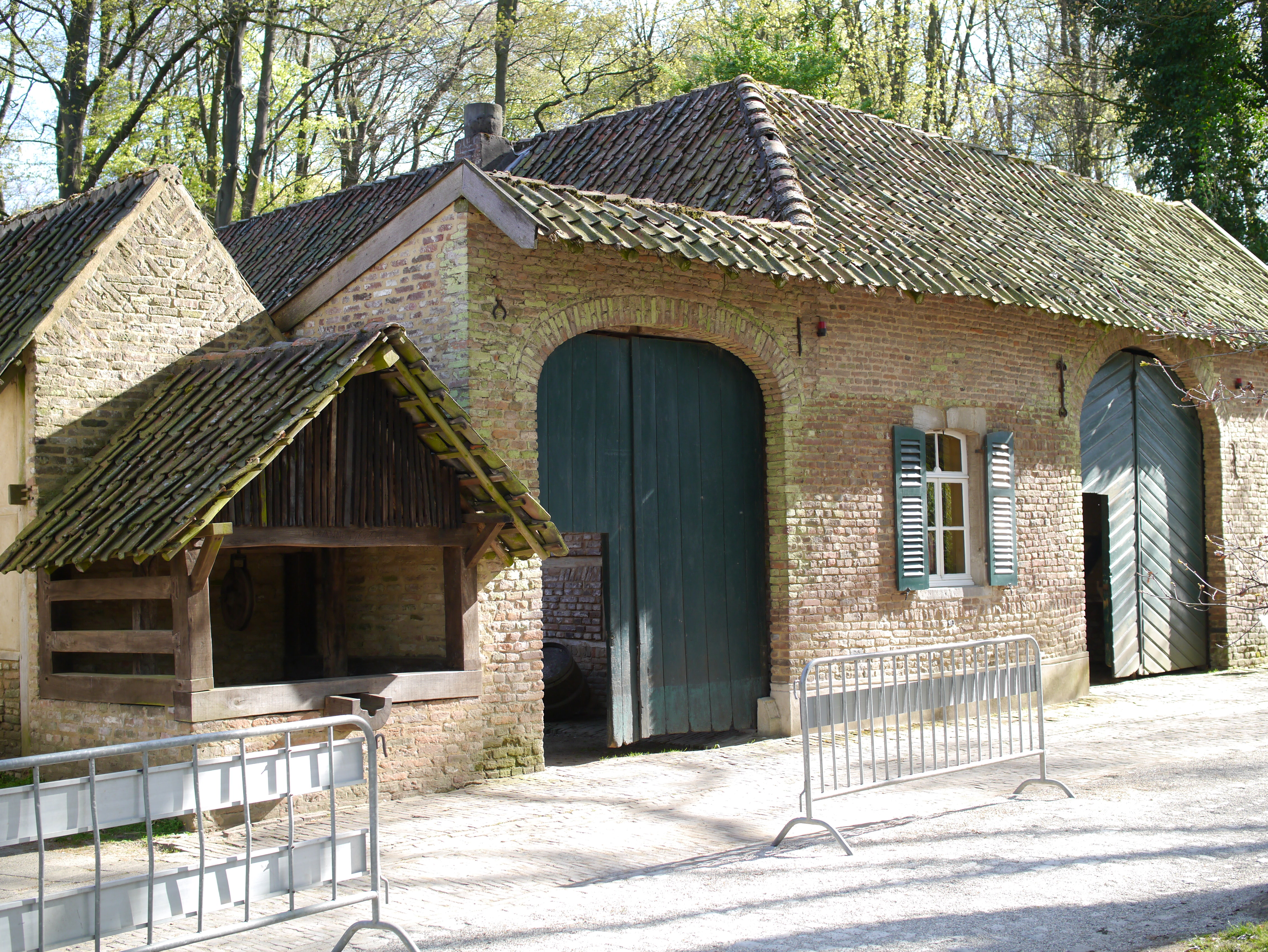 (80) Boerderij en puthuis, Krawinkel - Openluchtmuseum Arnhem